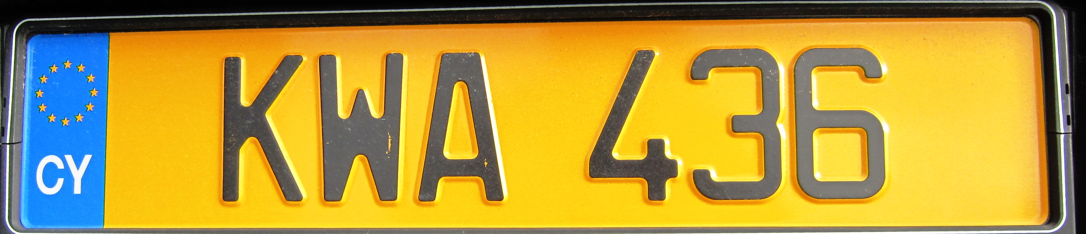 Nieuwe kentekenplaat Cyprus achter